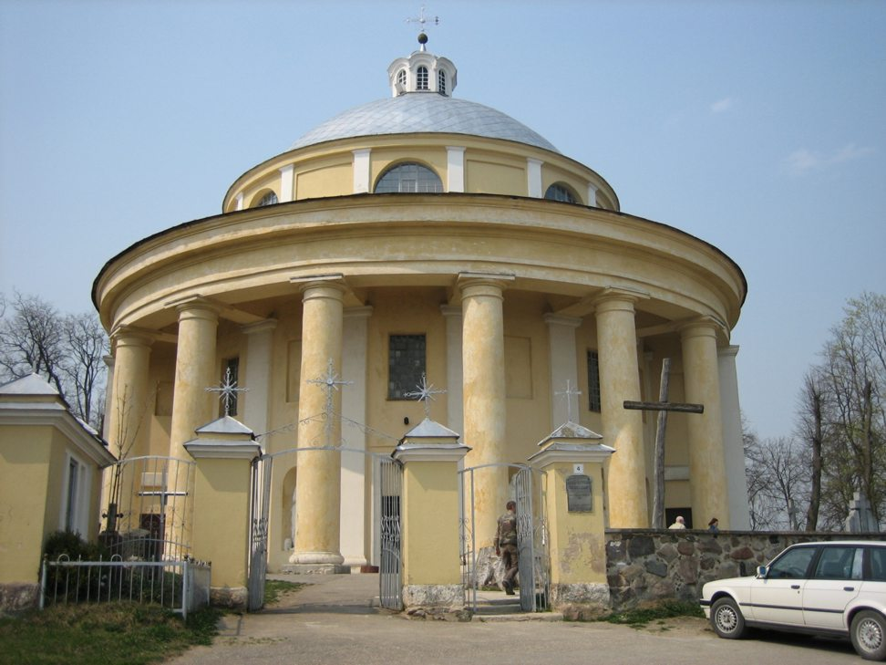 Sudervės bažnyčia. Architektas Stuoka-Gucevičius 1802 m.